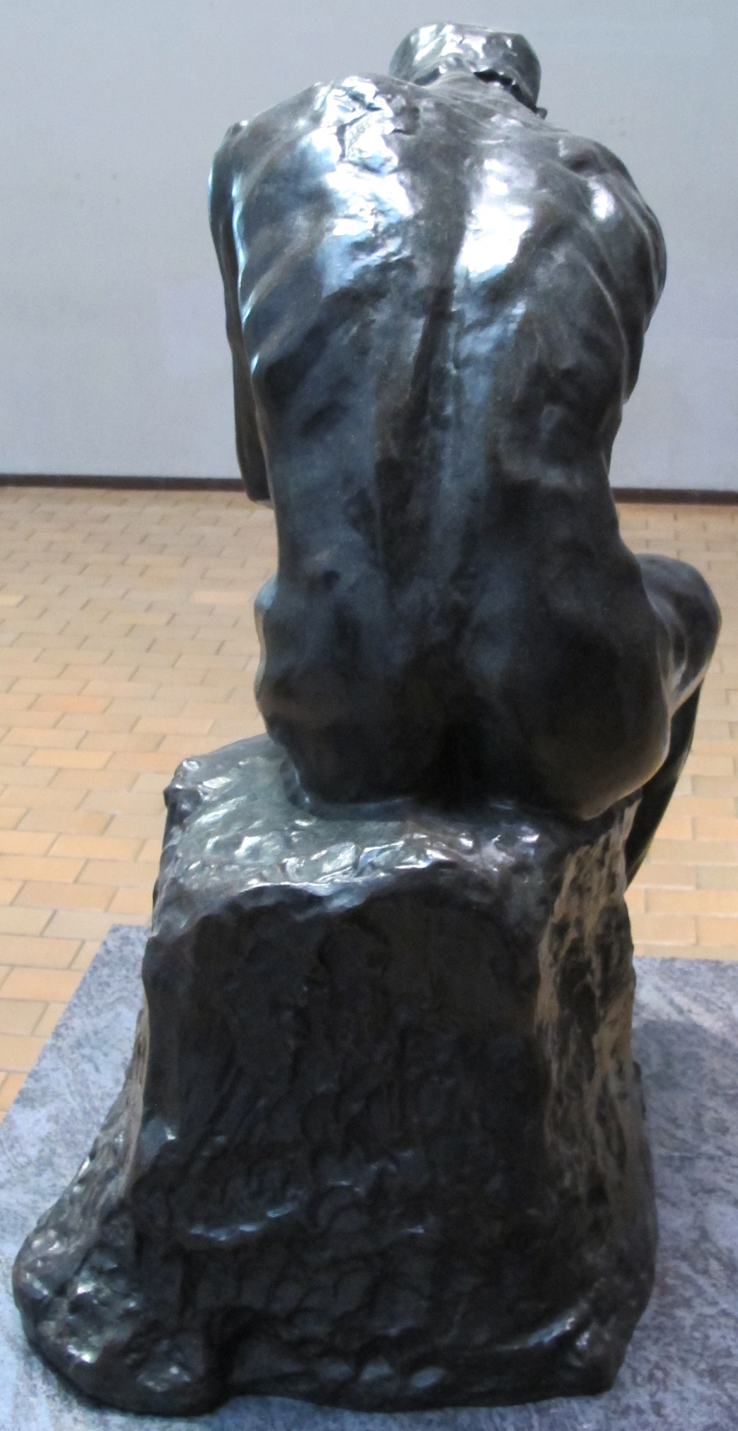 Auguste rodin, il pensatore, 1881-1882